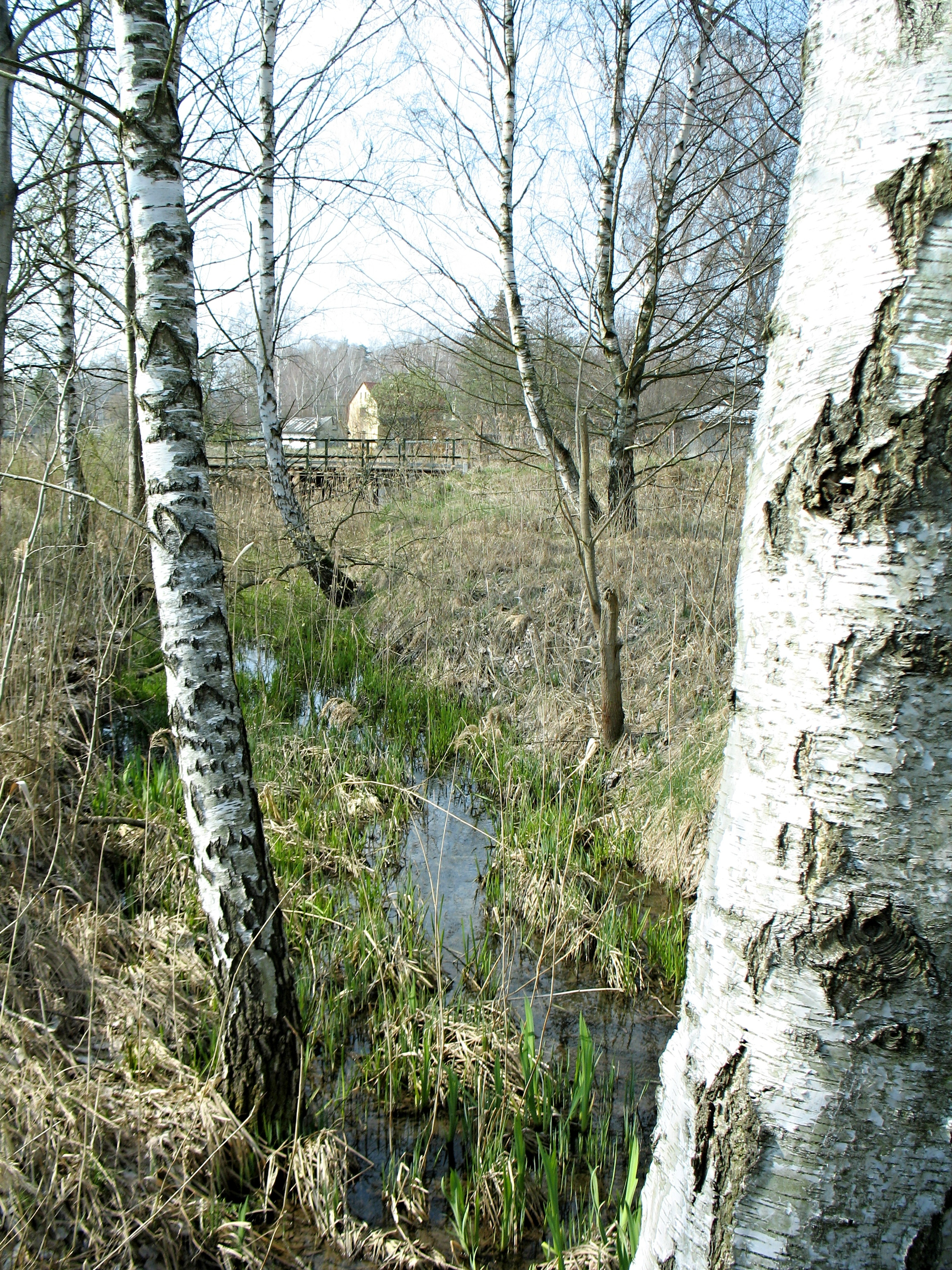 Horní tok Robečského potoka v obci Okna, Okres Česká Lípa.